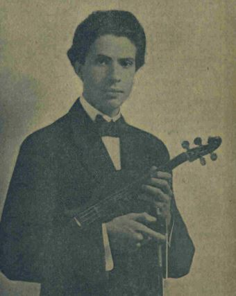 Joan Massià i Prats, a la revista El Teatre Català de 04/03/1916